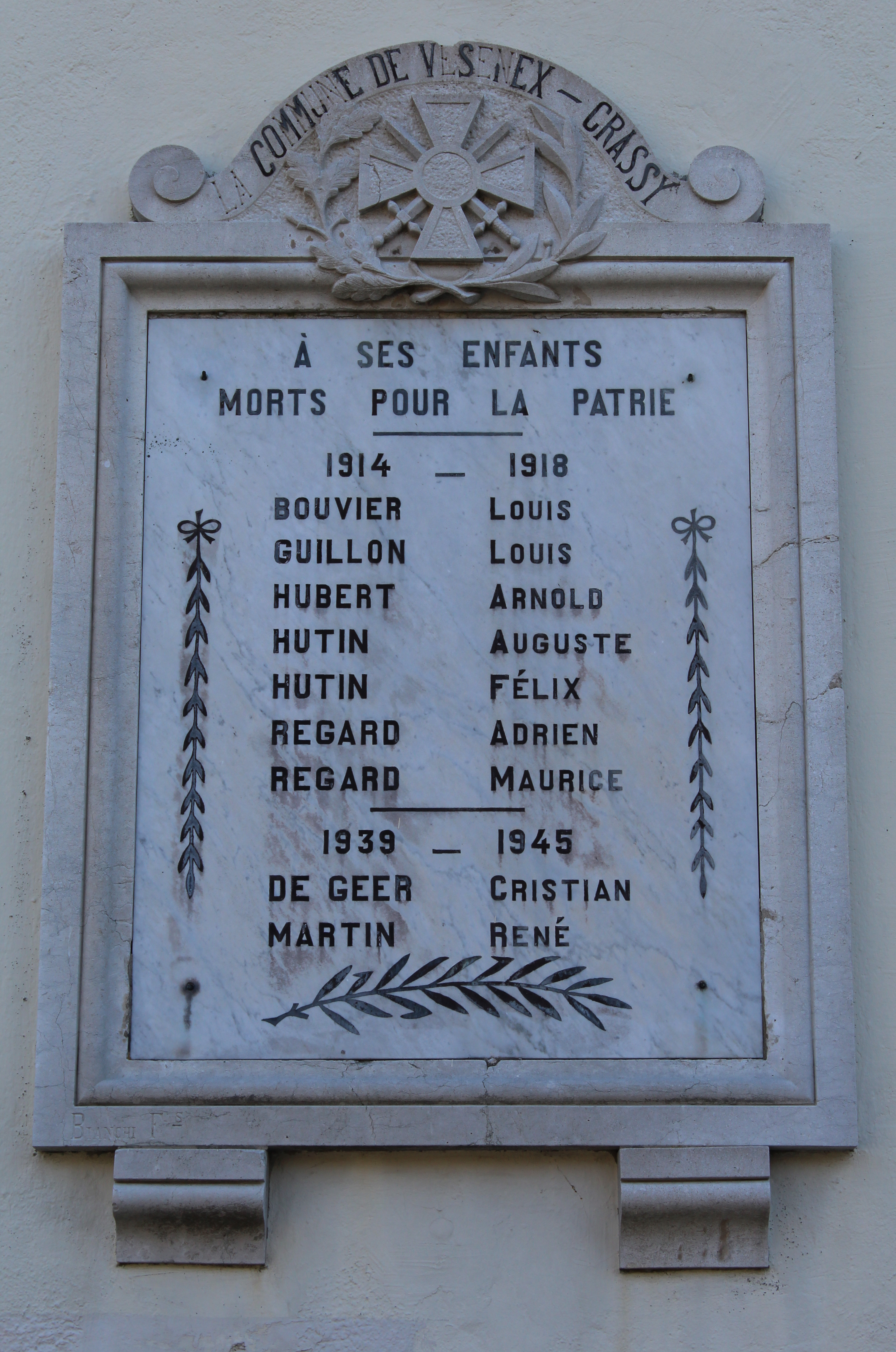 Monument aux morts de Vésenex-Crassy, Divonne-les-Bains.